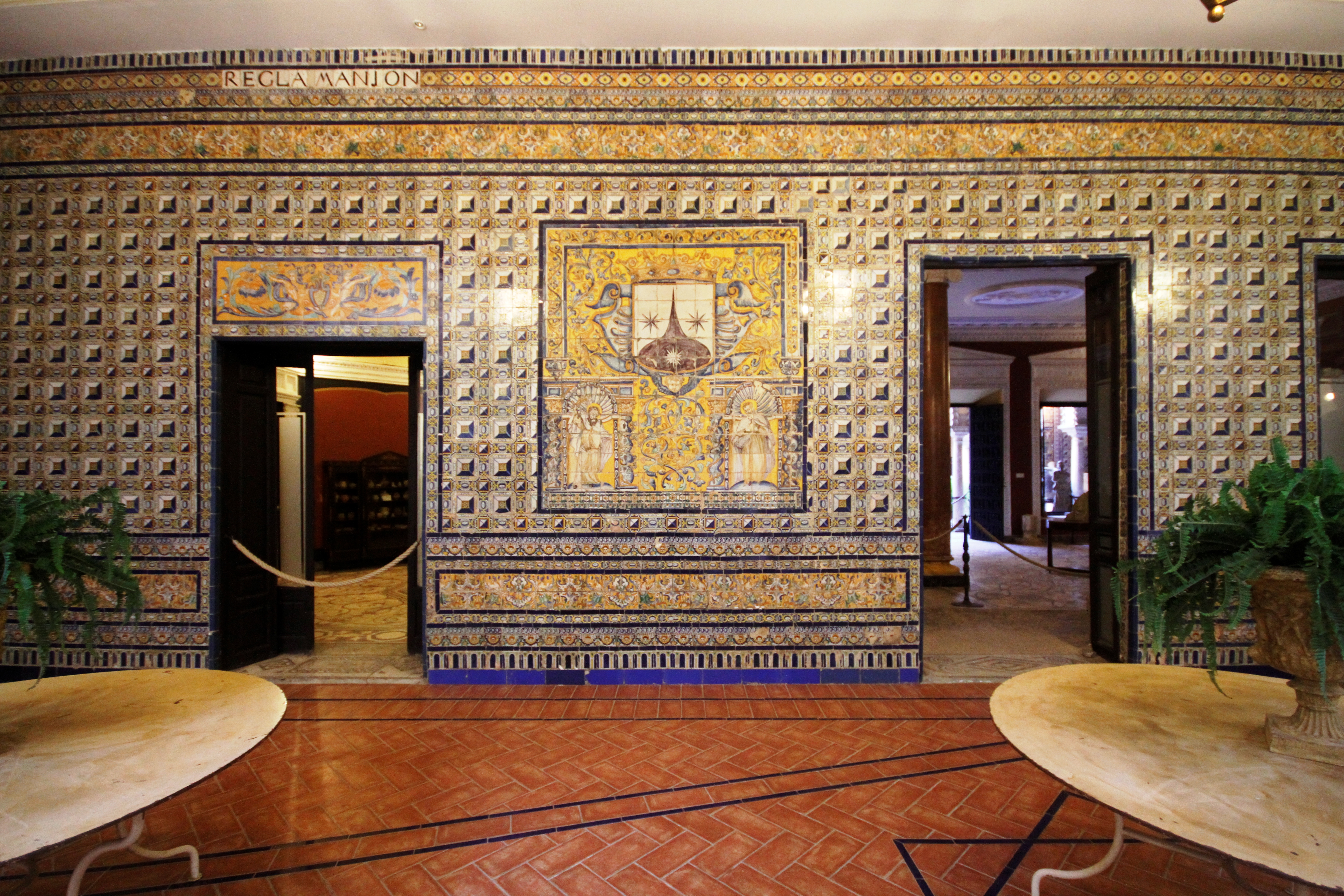 Parede com azulejos